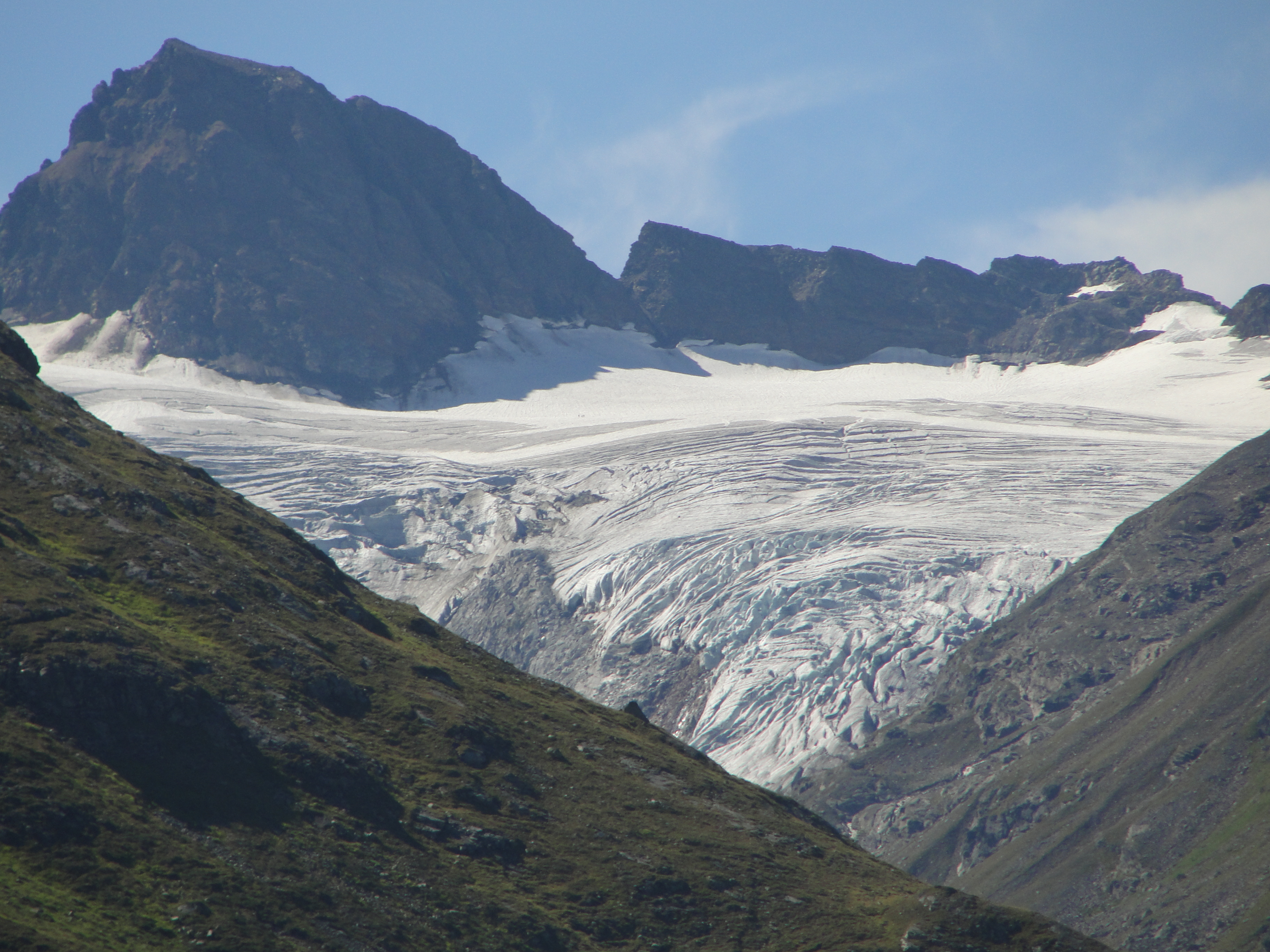 Silvretta Stausee Gletscher